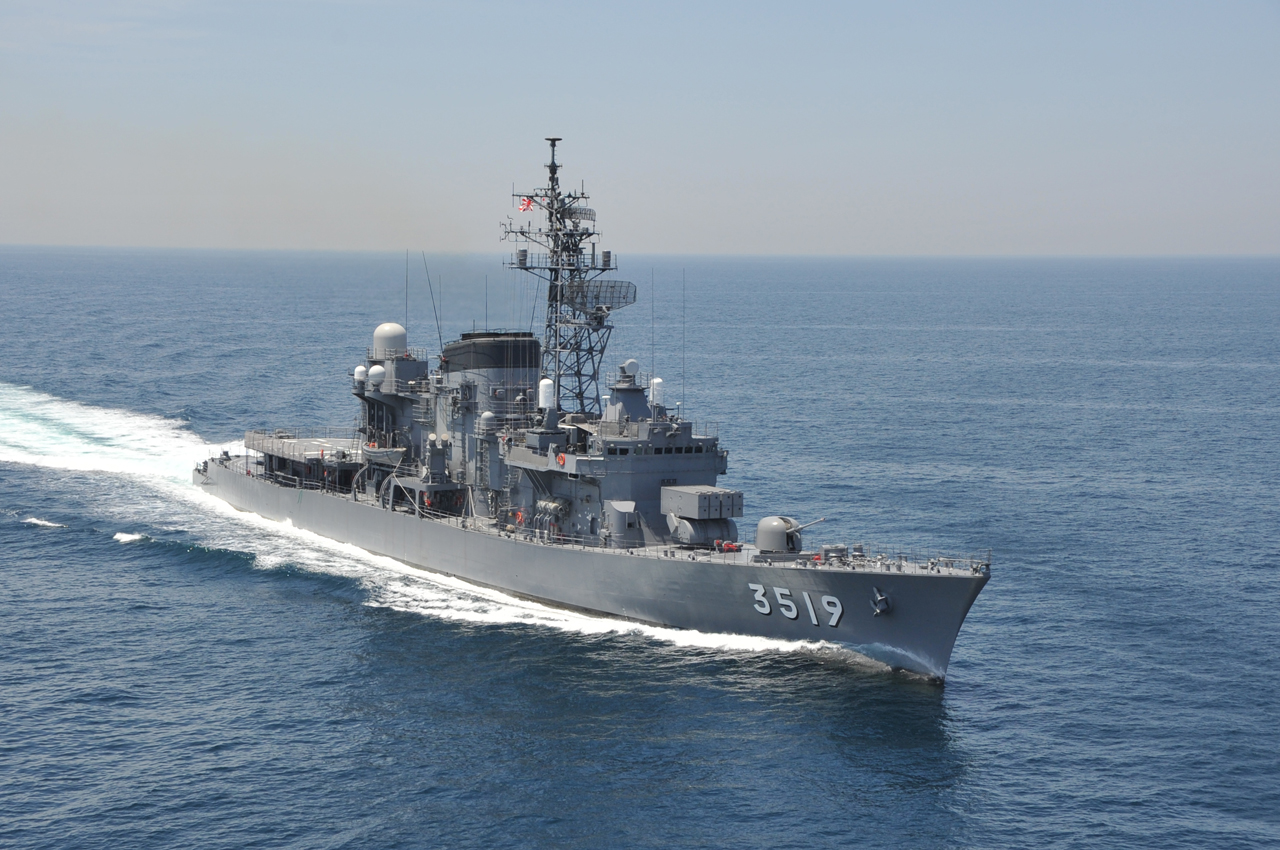 JMSDF TV JS "Yamayuki" in Cruse